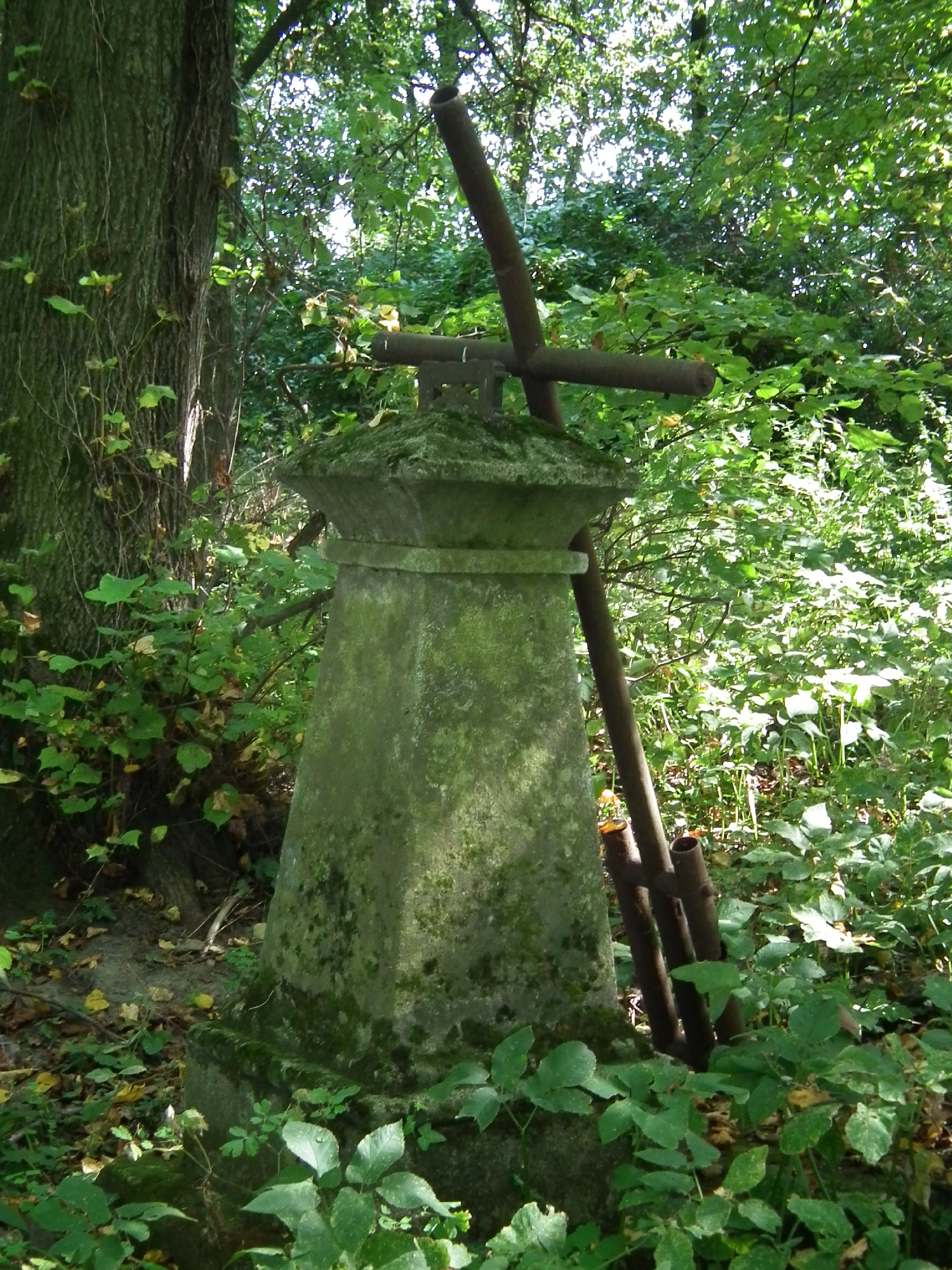 Kamień-Kolonia - cmentarz ewangelicko-augsburski, 2 poł. XIX, 1944